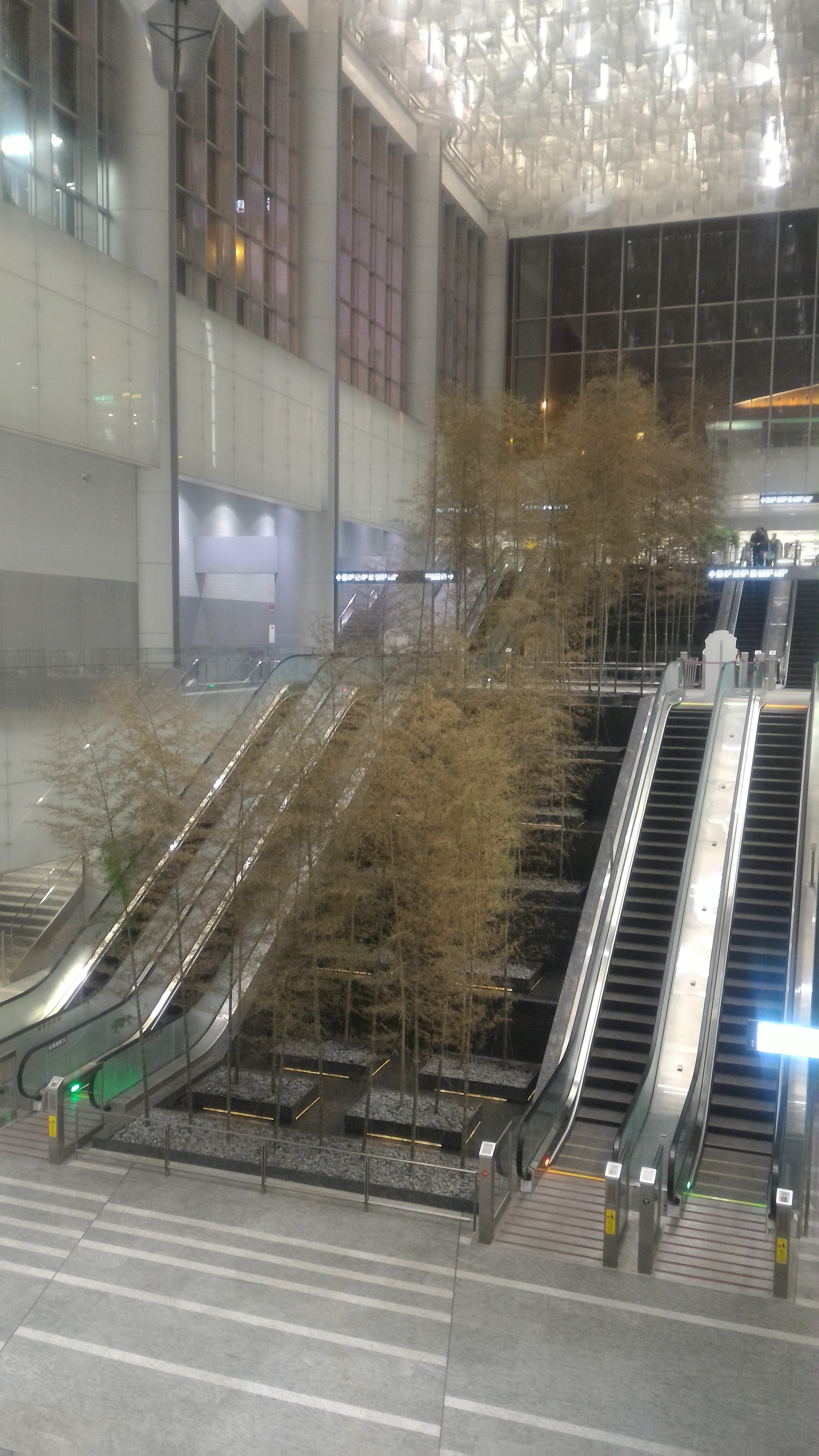 桃園國際機場捷運臺北車站穿堂層造景。